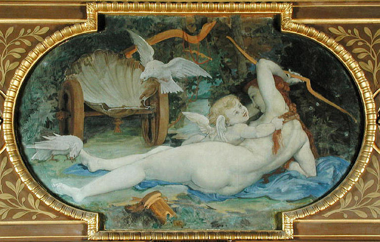 Venus jouant avec l'Amour